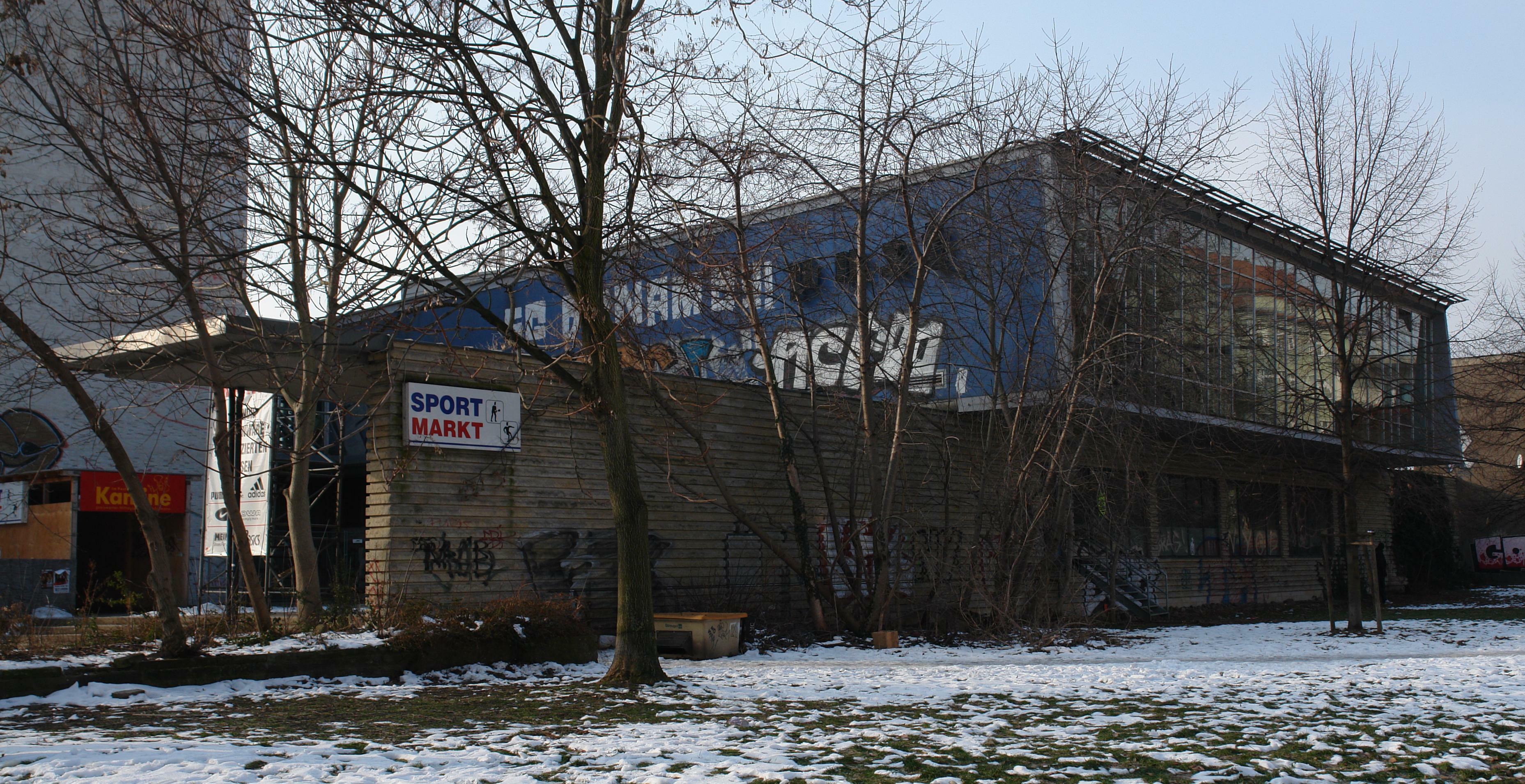 Kantine und ehemaliger Postschalter des Postamtes an der Königsbrücker Straße - leider eingewachsen